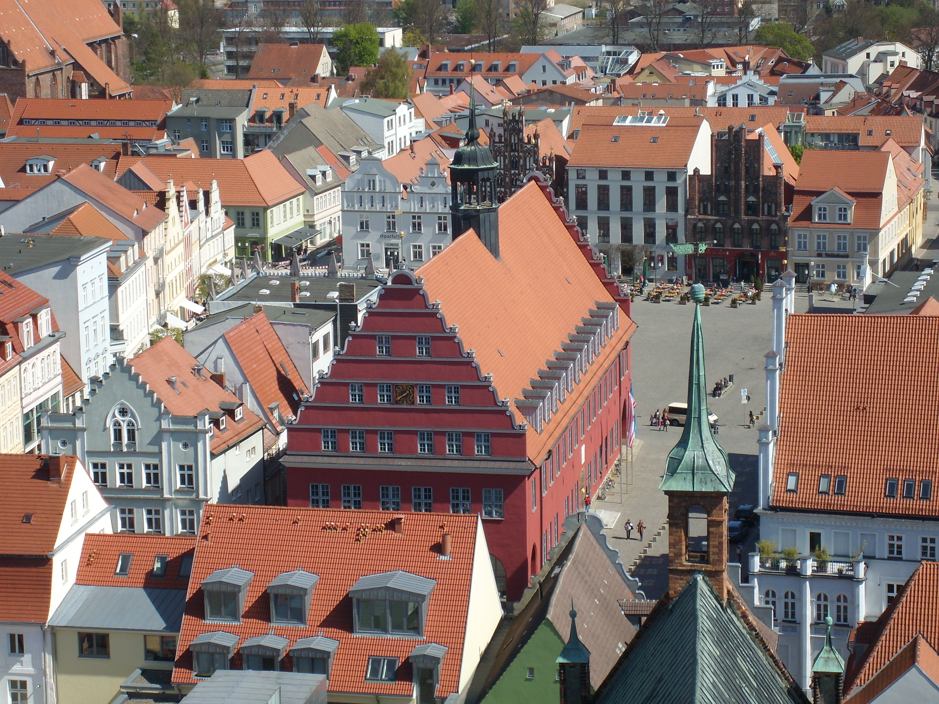 Blick von der Aussichtsplattform (auf 60 m Höhe) des Turms des Greifswalder Doms St. Nikolai nach Osten auf das historische Rathaus am Marktplatz.